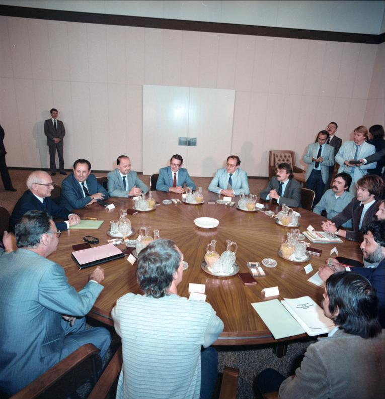 Berlin, Honecker empfängt BRD-Umweltschützer ADN/ZB/Schindler/5.9.84/Berlin: Der Generalsekretär des ZK der SED und Vorsitzende des Staatsrates der DDR, Erich Honecker, empfing eine in der DDR weilende Abordnung des Bundesverbandes Bürgerinitiative Umweltschutz e.V. (BBU) aus der BRD zu einem Meinungsaustausch. An dem Gespräch nahmen u.a. teil: Herbert Häber, Mitglied des Politbüros und Sekretär des ZK der SED (2.v.r.) und Frank Joachim Herrmann, Kandidat des ZK der SED, Staatssekretär, Leiter der Kanzlei des Vorsitzenden des Staatsrates (3.v.r.). 1984/0905/403 R Abgebildete Personen: Häber, Herbert: Stellvertretender Staatssekretär für gesamtdeutsche Fragen, DDR Honecker, Erich: Staatsratsvorsitzender, Generalsekretär des ZK der SED, DDR (GND 118553399) Herrmann, Frank Joachim: Leiter der Kanzlei des Vorsitzenden des Staatsrates, DDR